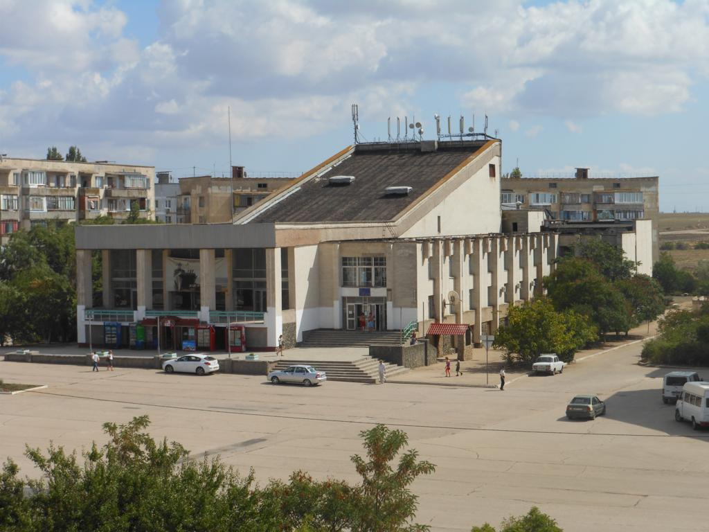 Дом офицеров в Новоозёрном